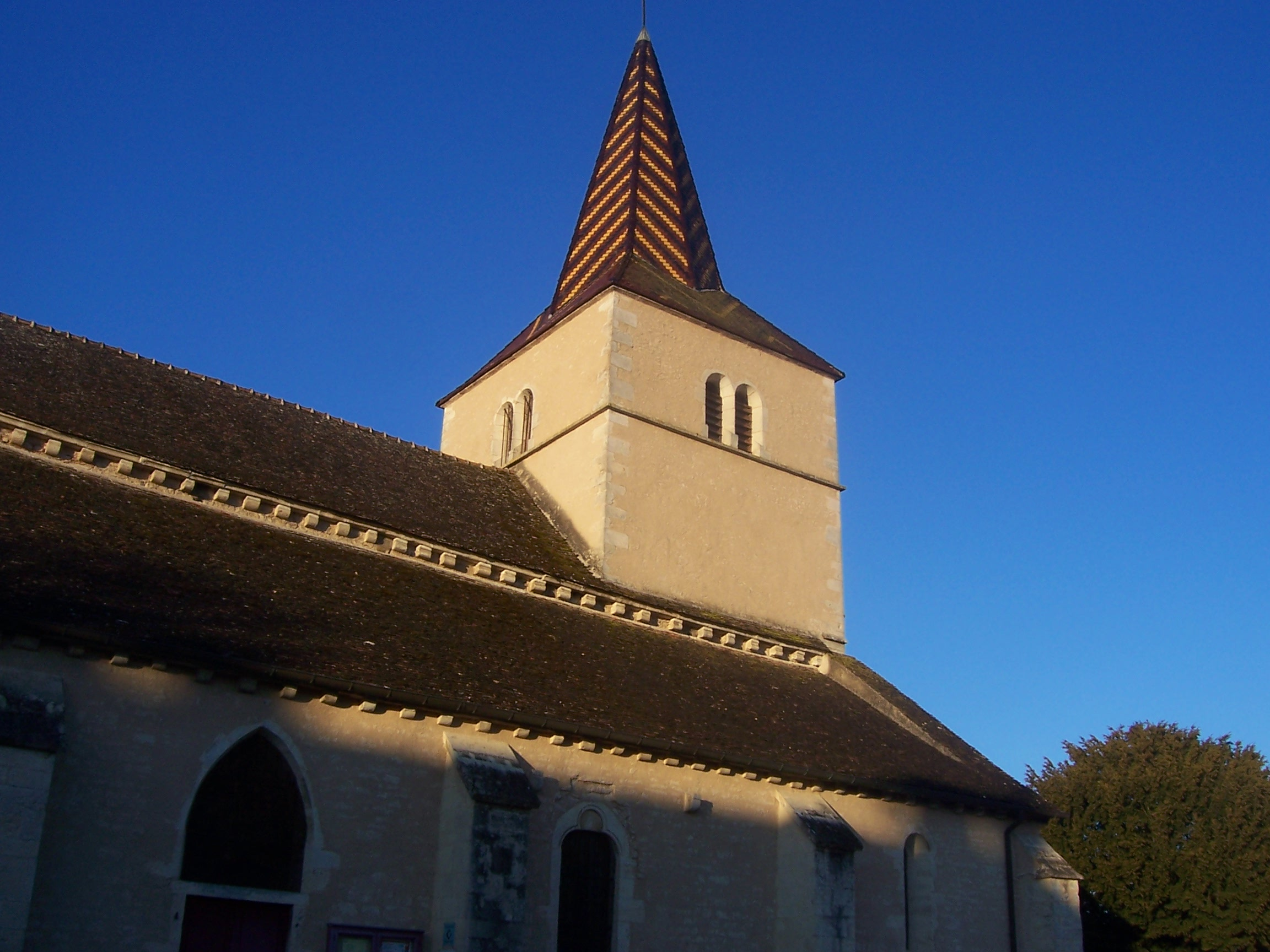 Eglise de Chaudenay